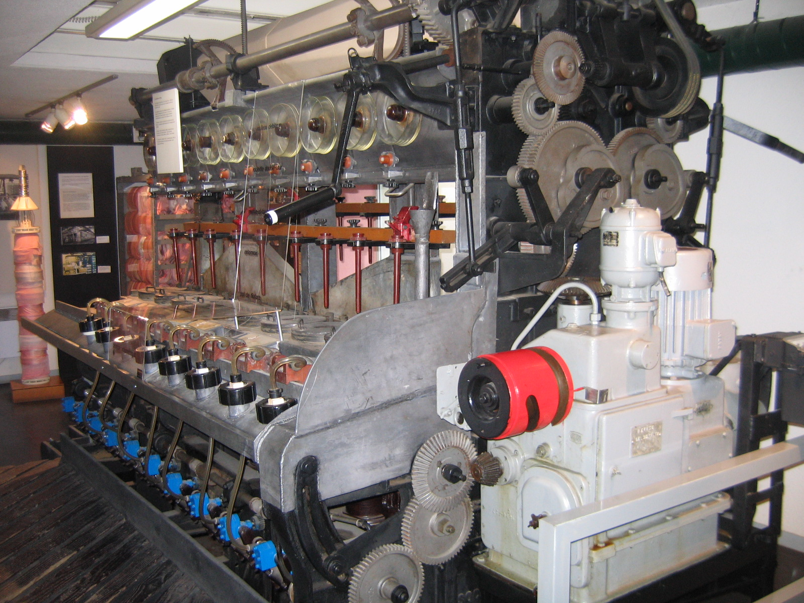 photo prise au musée de la Viscose à Echirolles : fileuse à Viscose